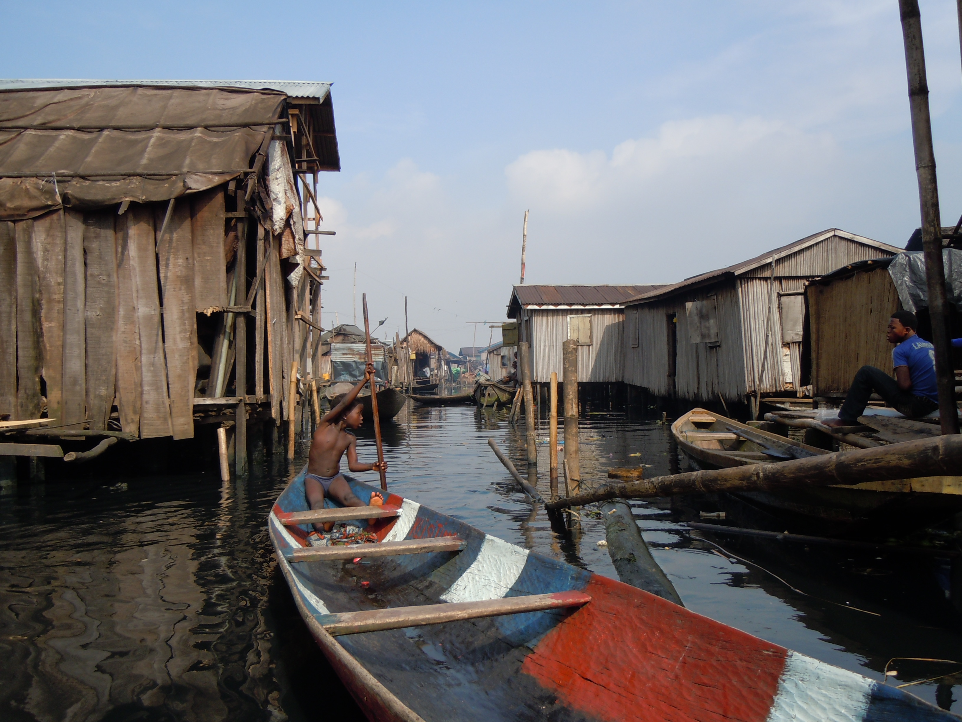 Foto: Heinrich-Böll-Stiftung